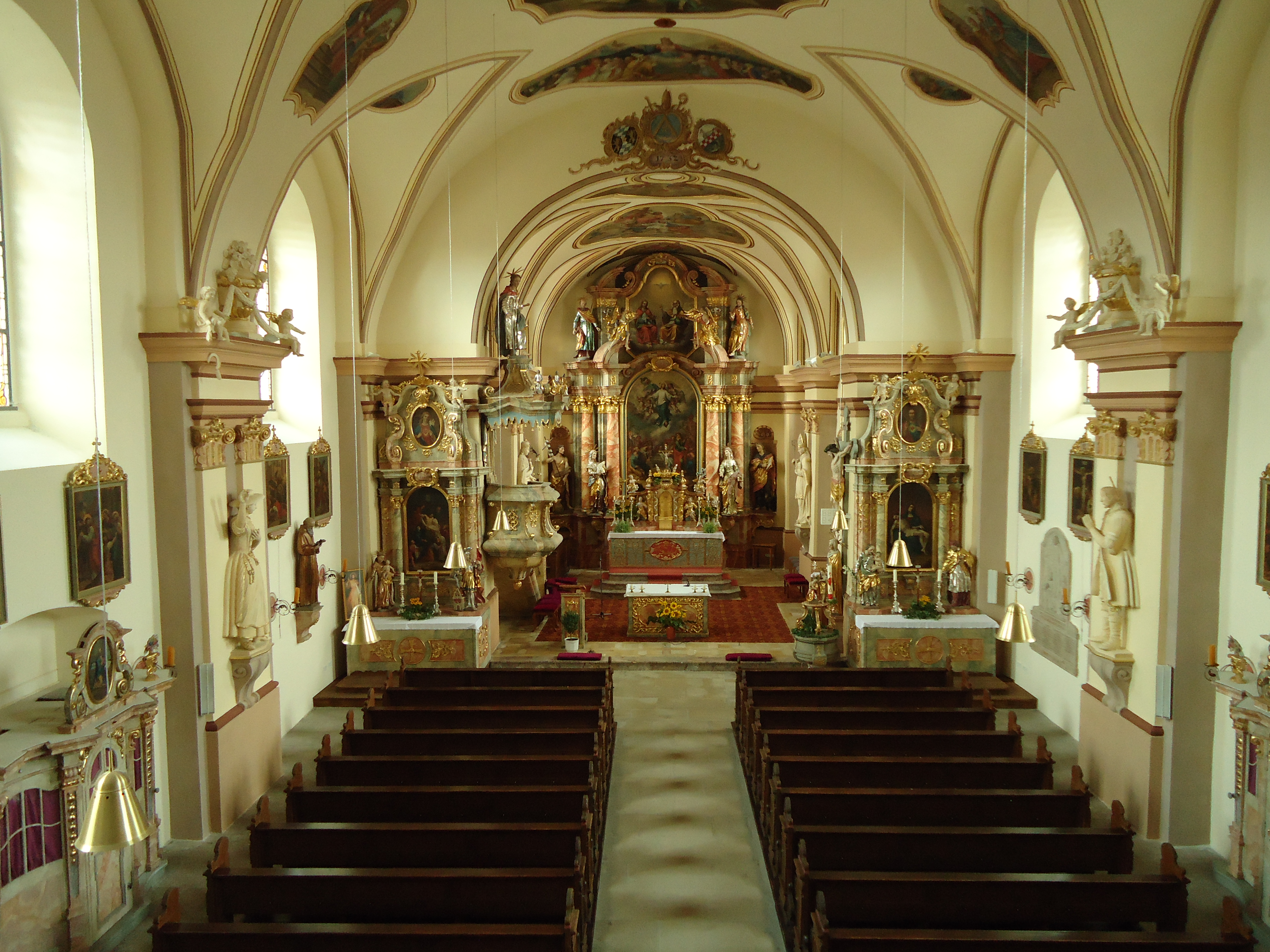 Pfarrkirche Mariä Himmelfahrt in Beidl - Innenraum